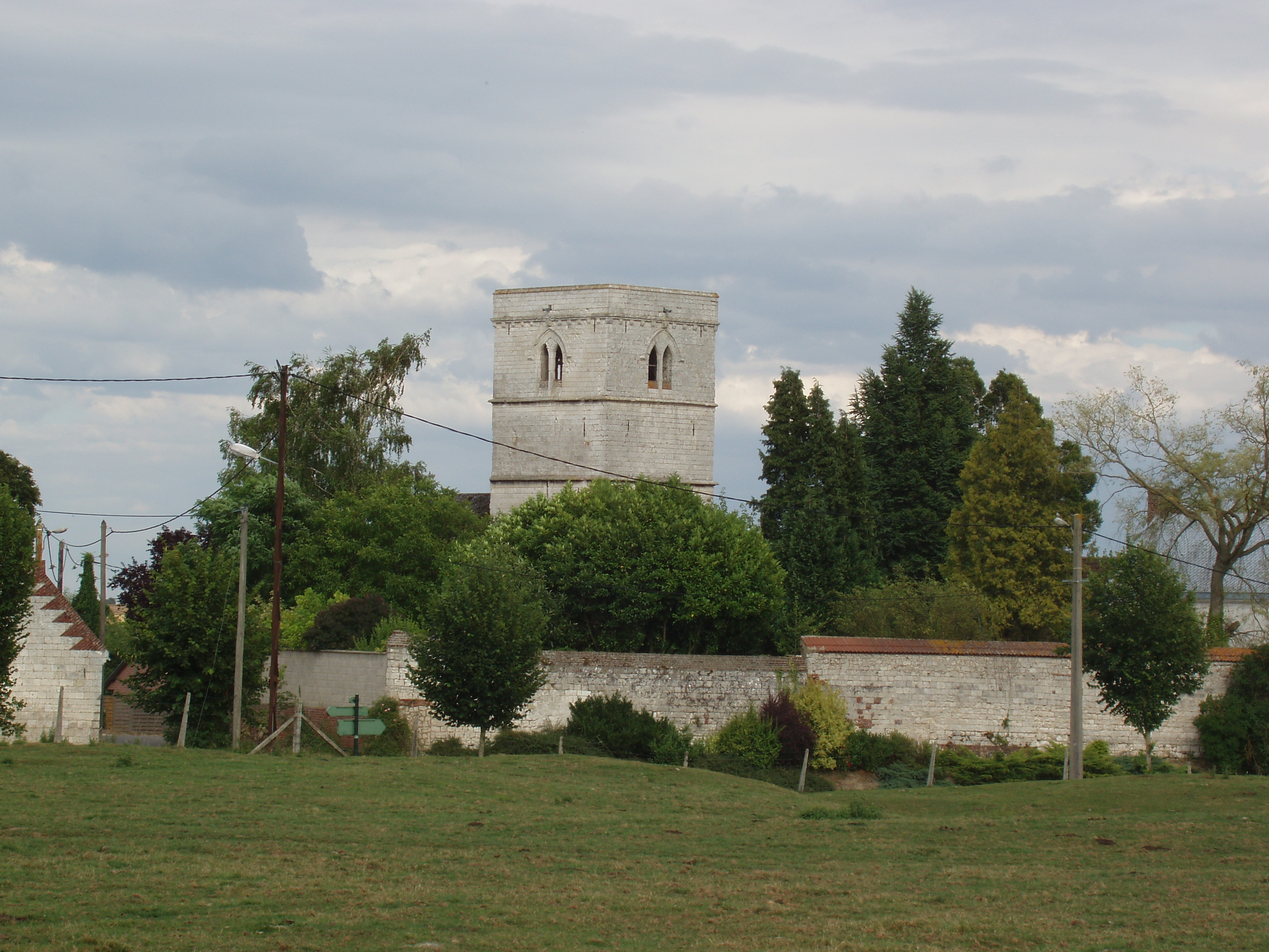 Commune française de Montenescourt dans le département du Pas-de-Calais en France - Église, vue du cimetière